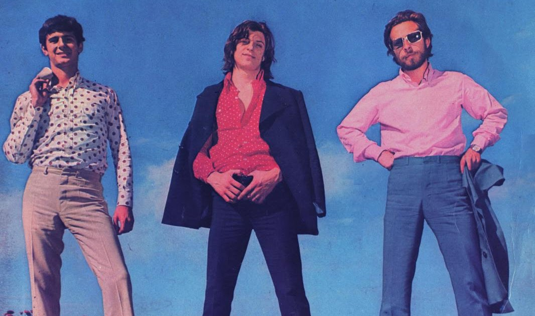 Foto do trio argentino Galleta, em 1970, para a capa do álbum Estoy Herido.